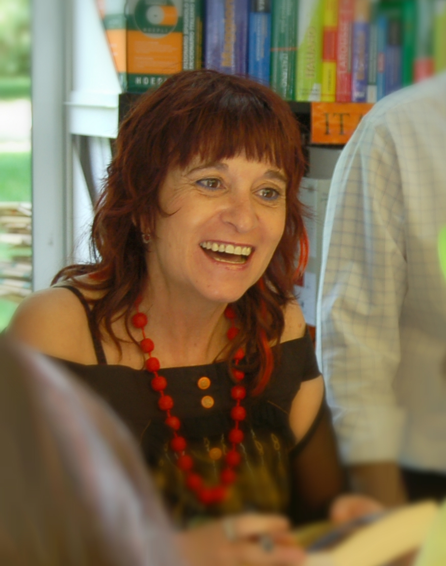 Rosa Montero in a book signing. Feria del Libro, Madrid, Spain.